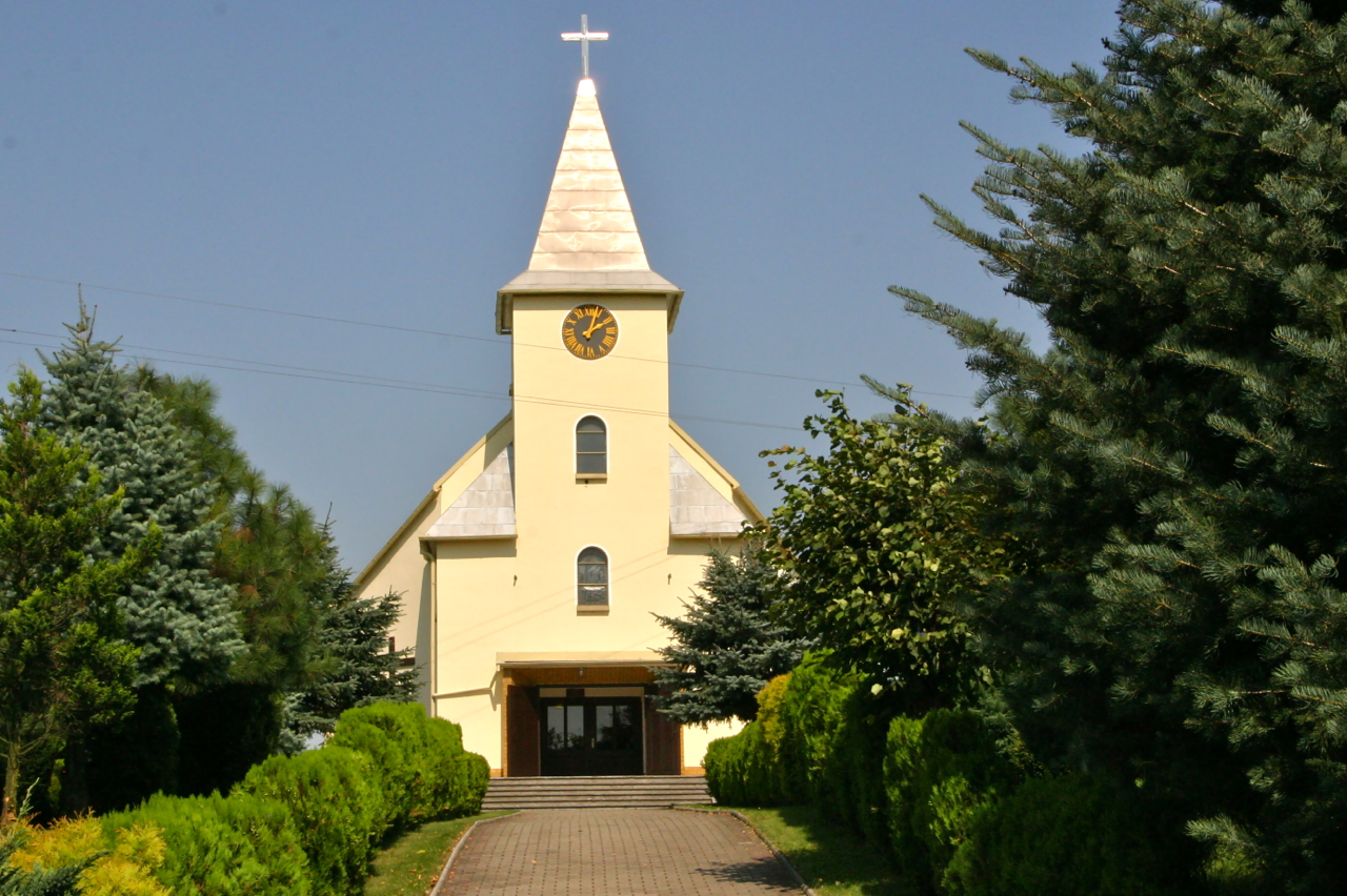 Rozkochów (dodatkowa nazwa w j. niem. Dobersdorf) - wieś w Polsce położona w województwie opolskim, w powiecie krapkowickim, w gminie Walce.